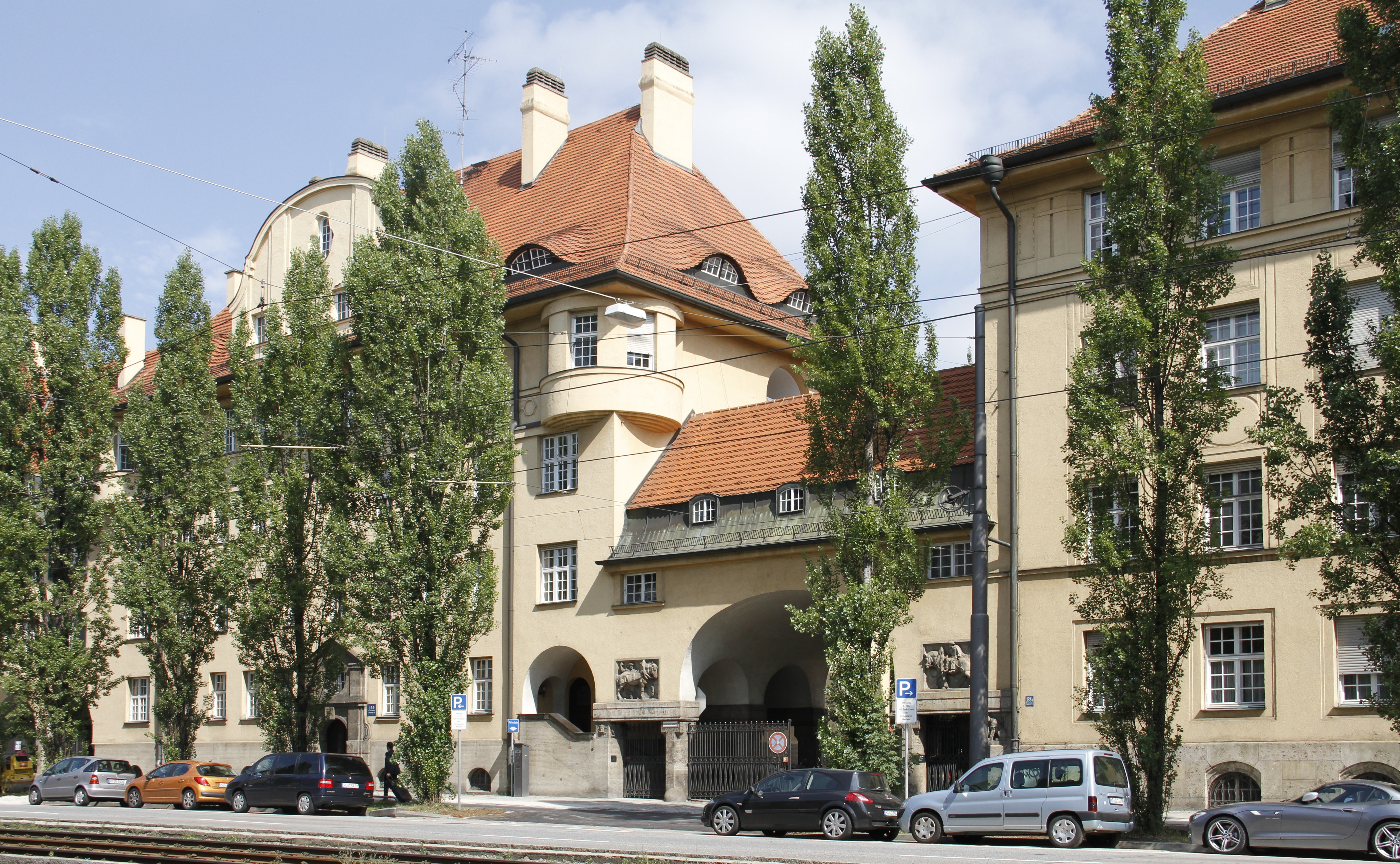 Hauptzollamt München. Beamtenwohnhäuser, Häuser B und C, Südfassaden an der Landsberger Straße